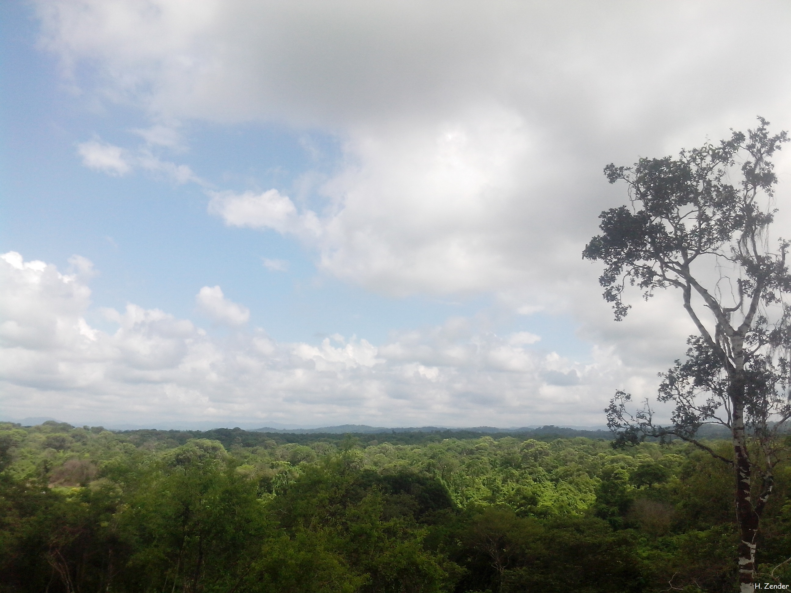 Temporada tropical.